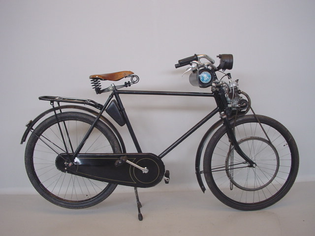 Rex bromfiets 1952.